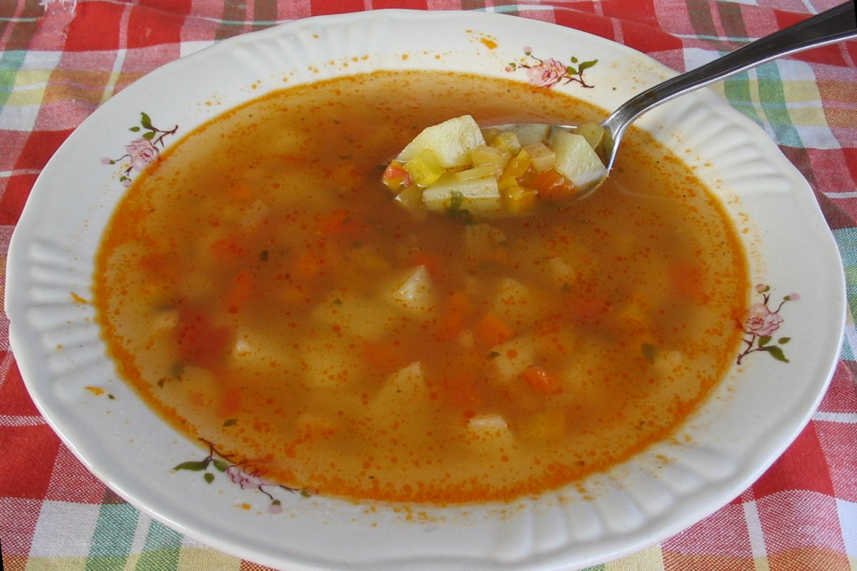 Potato soup